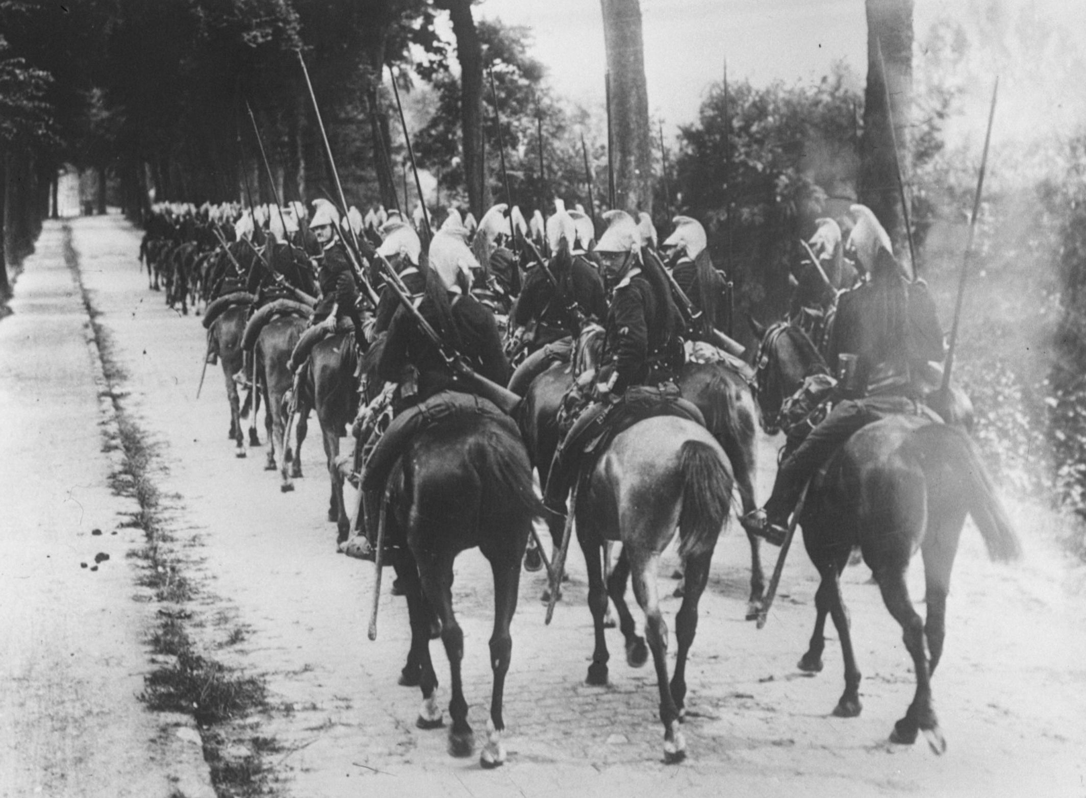 Dragons français traversant Montmort-Lucy, dans la Marne.